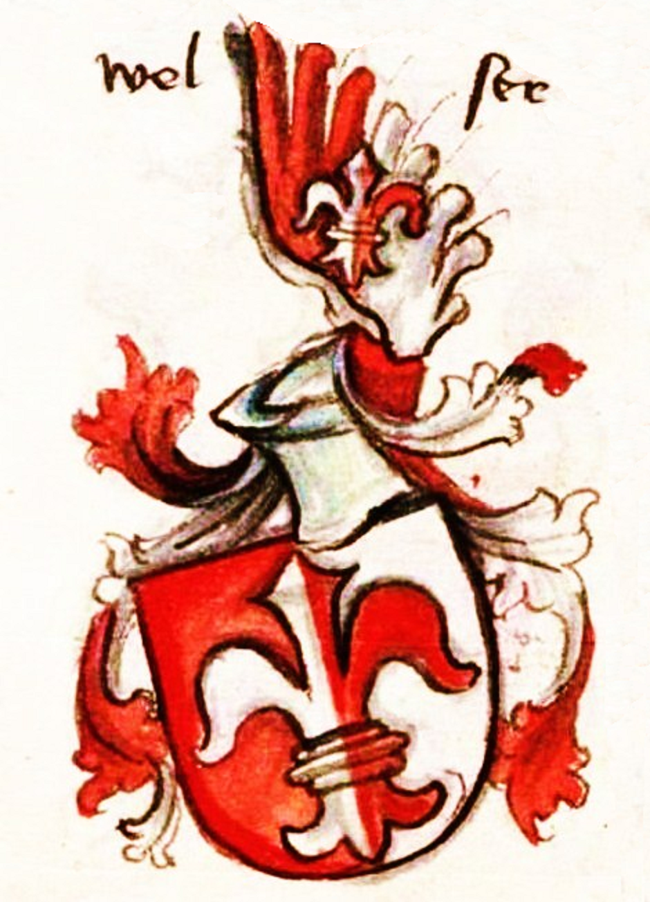 Stammwappen der Welser, eine Augsburger und Nürnberger Patrizierfamilie von Großkaufleuten, in der ehemals freien Reichsstadt Augsburg seit 1246 nachgewiesen.